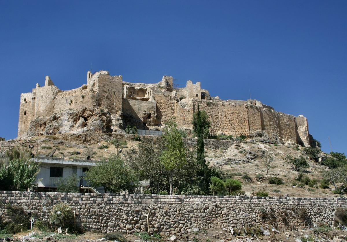 Masyaf